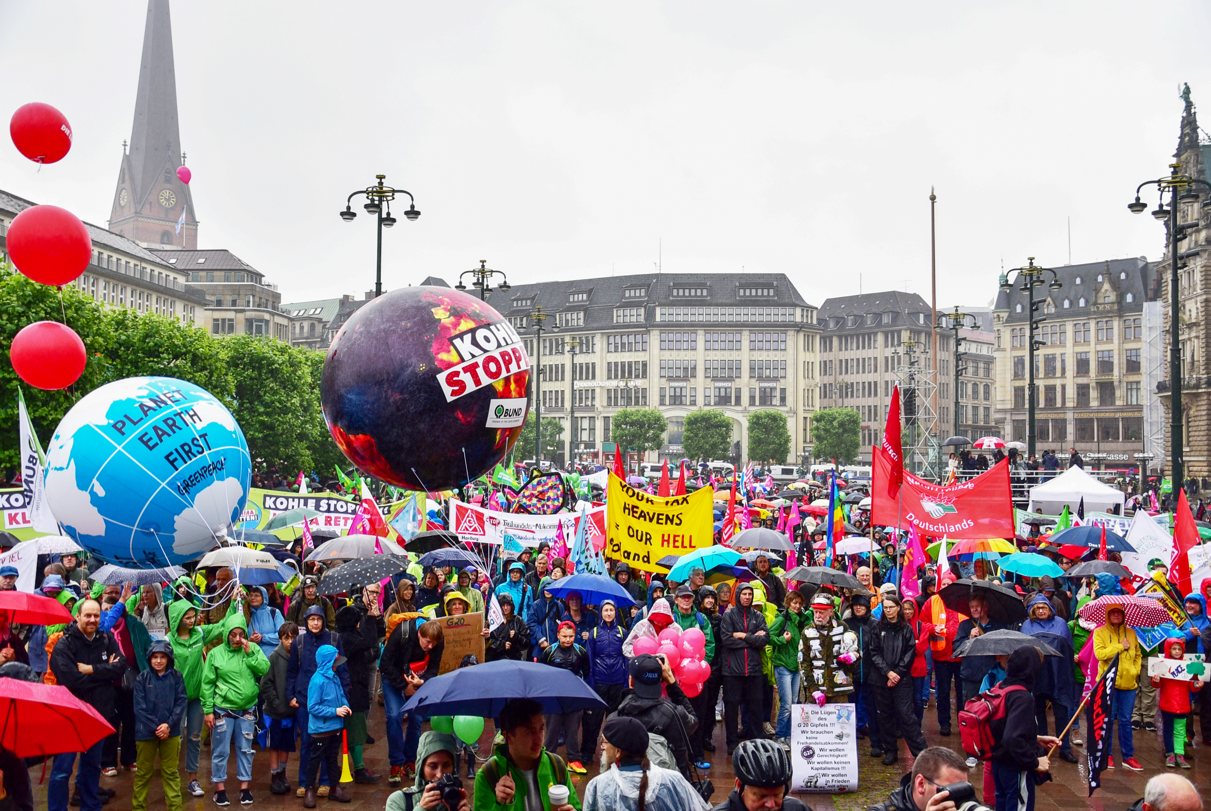 Kundgebung bei der G20-Protestwelle auf dem Hamburger Rathausplatz